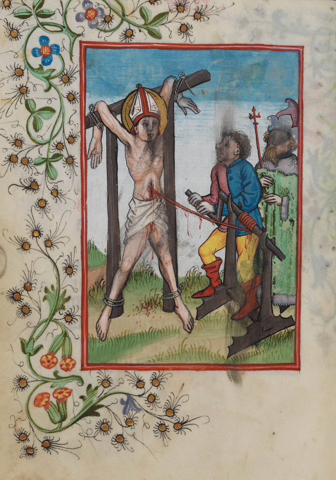 Illuminierte Seite aus dem Waldburg-Gebetbuch, WLB Stuttgart, Cod. brev. 12, fol. 40v; Martyrium des Hl. Erasmus